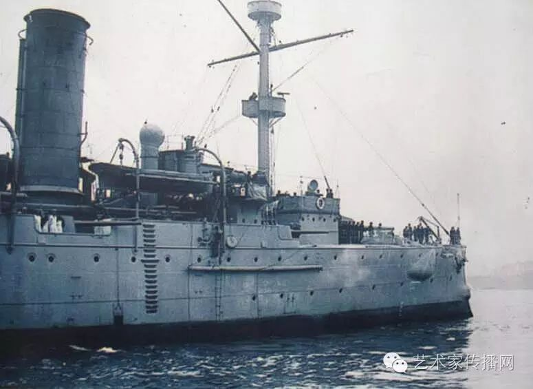 清朝海军海圻号军舰